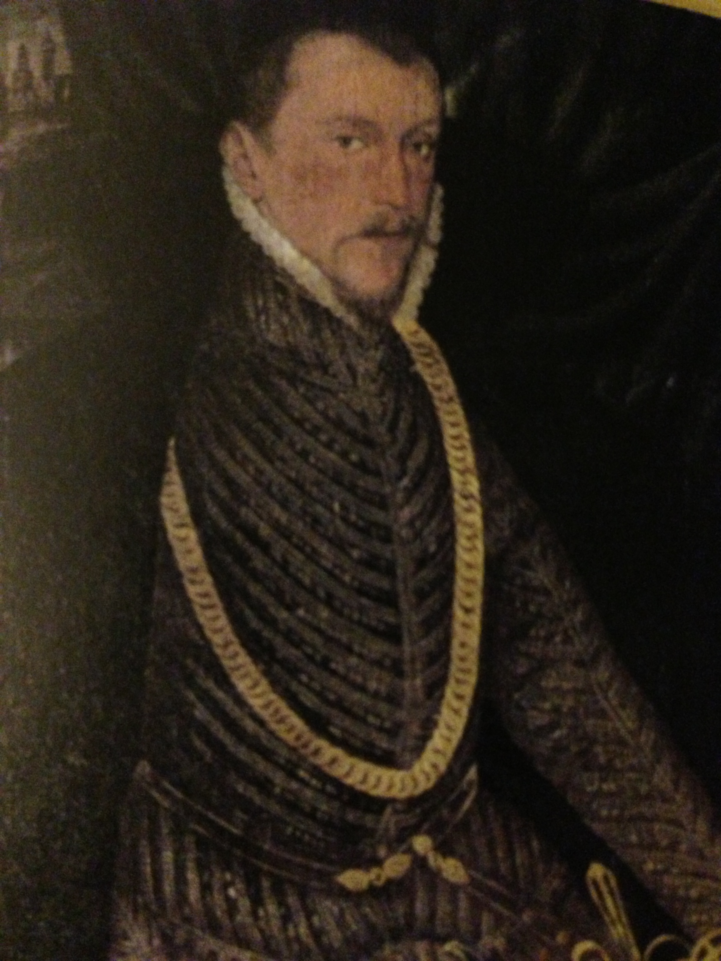 Graf Albrecht VII. von Schwarzburg-Rudolstadt. Die Fotografie wurde im Dezember 2012 erstellt.